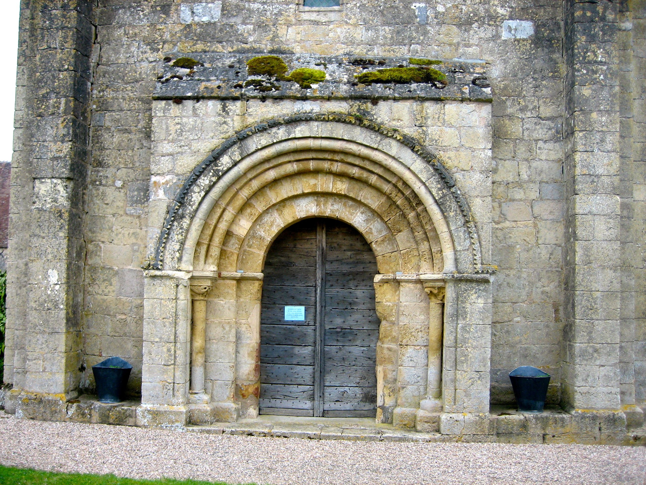 Portail de l'église Saint-Georges de Saint-Jeanvrin